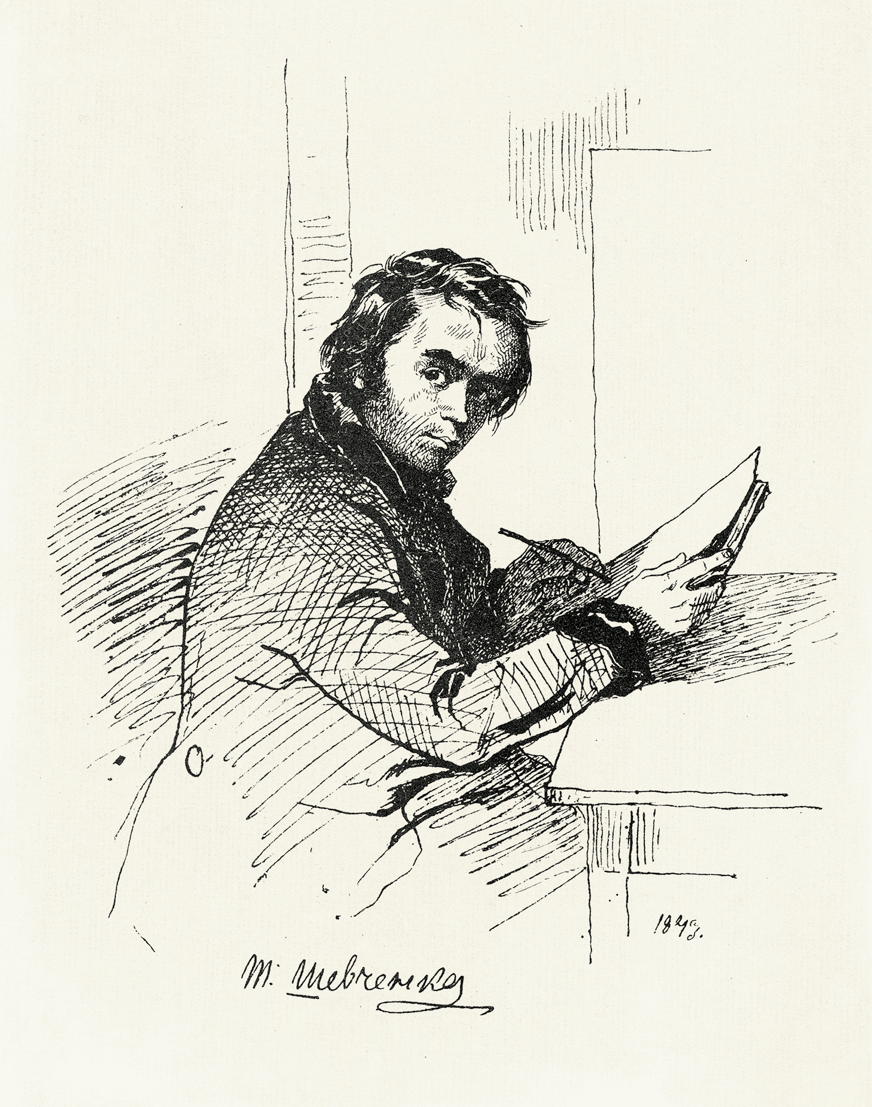 Автопортрет виконано у дзеркальному відображенні. Даруючи Варварі Рєпніній рукопис поеми «Тризна», Шевченко пообіцяв наступного дня (28 листопада 1843) додати до нього автопортрет. В. Рєпніна зберігала подарований Шевченком автопортрет до кінця життя (1891). Місця зберігання: з 1843 – власність В. М. Рєпніної; з 1891 – Є. М. Орлової; з 1935 у колекції І. С. Зільберштейна; з 1985 – Музей приватних колекцій Державнго музю образотворчих мистецтв імені О. С. Пушкіна (Москва).